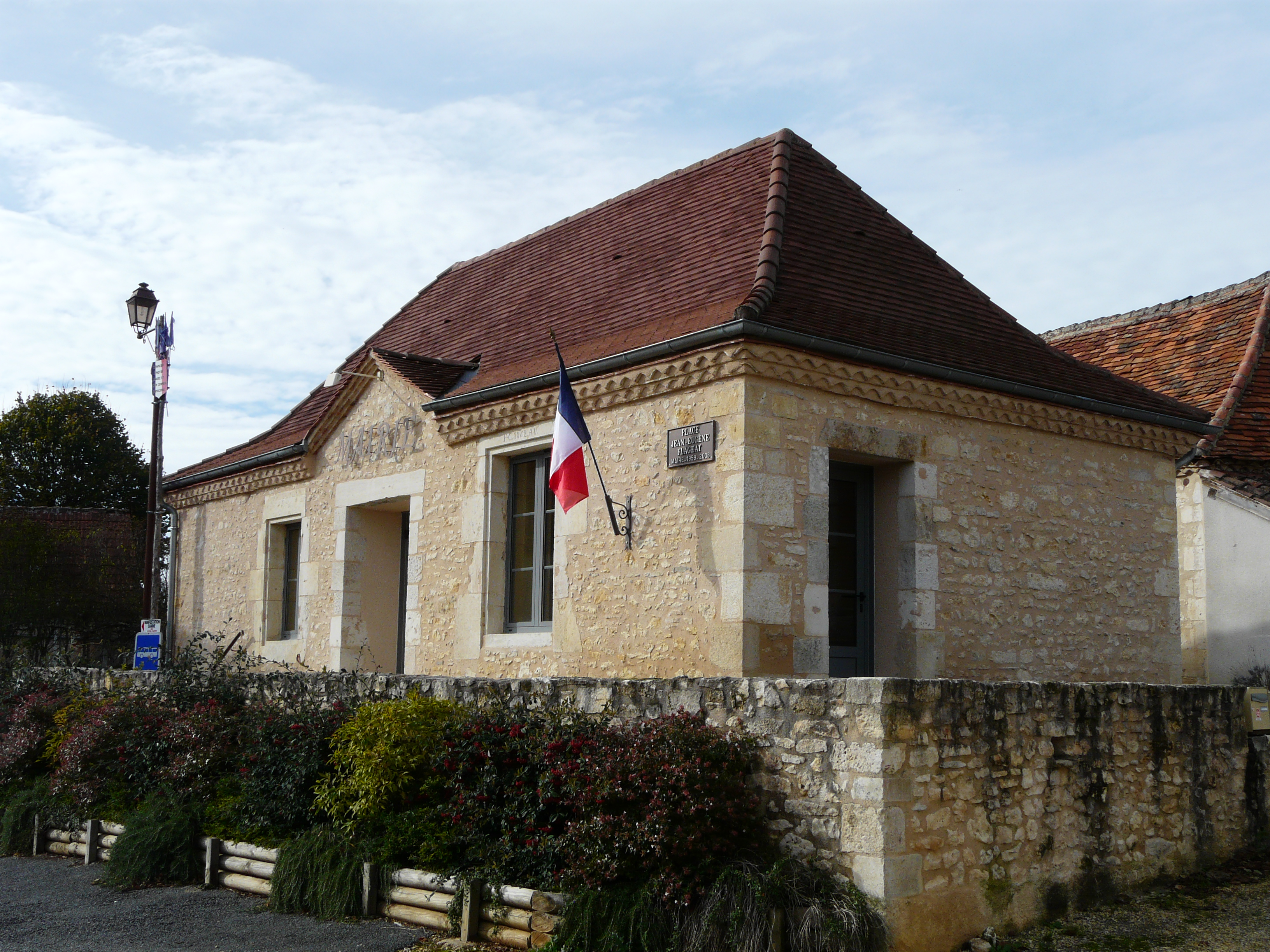 La mairie de Montagnac-d'Auberoche, Dordogne, France.